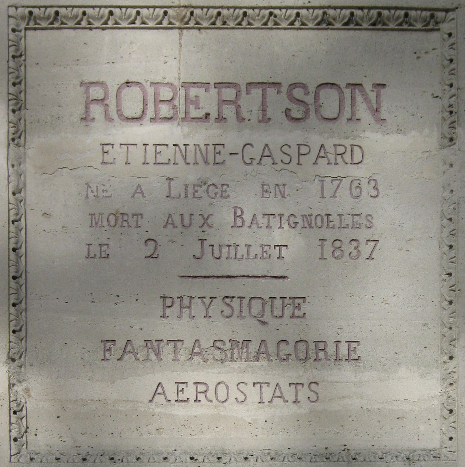 Monument rectangulaire surmonté d'un sarcophage.